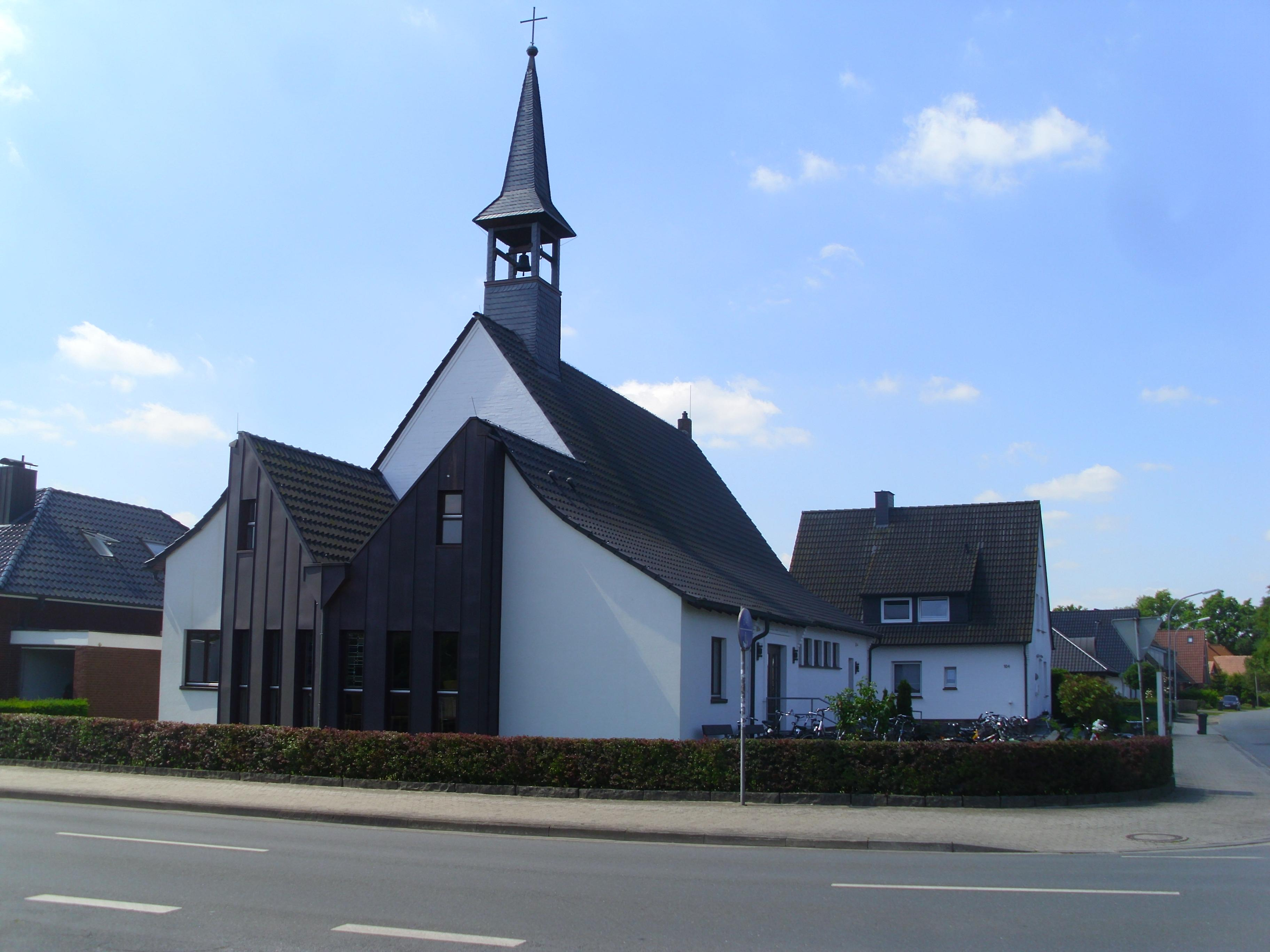 Evangelische Gnadenkirche in Neuenkirchen (Kreis Steinfurt) an Ecke Emsdettener Straße, Ringstraße